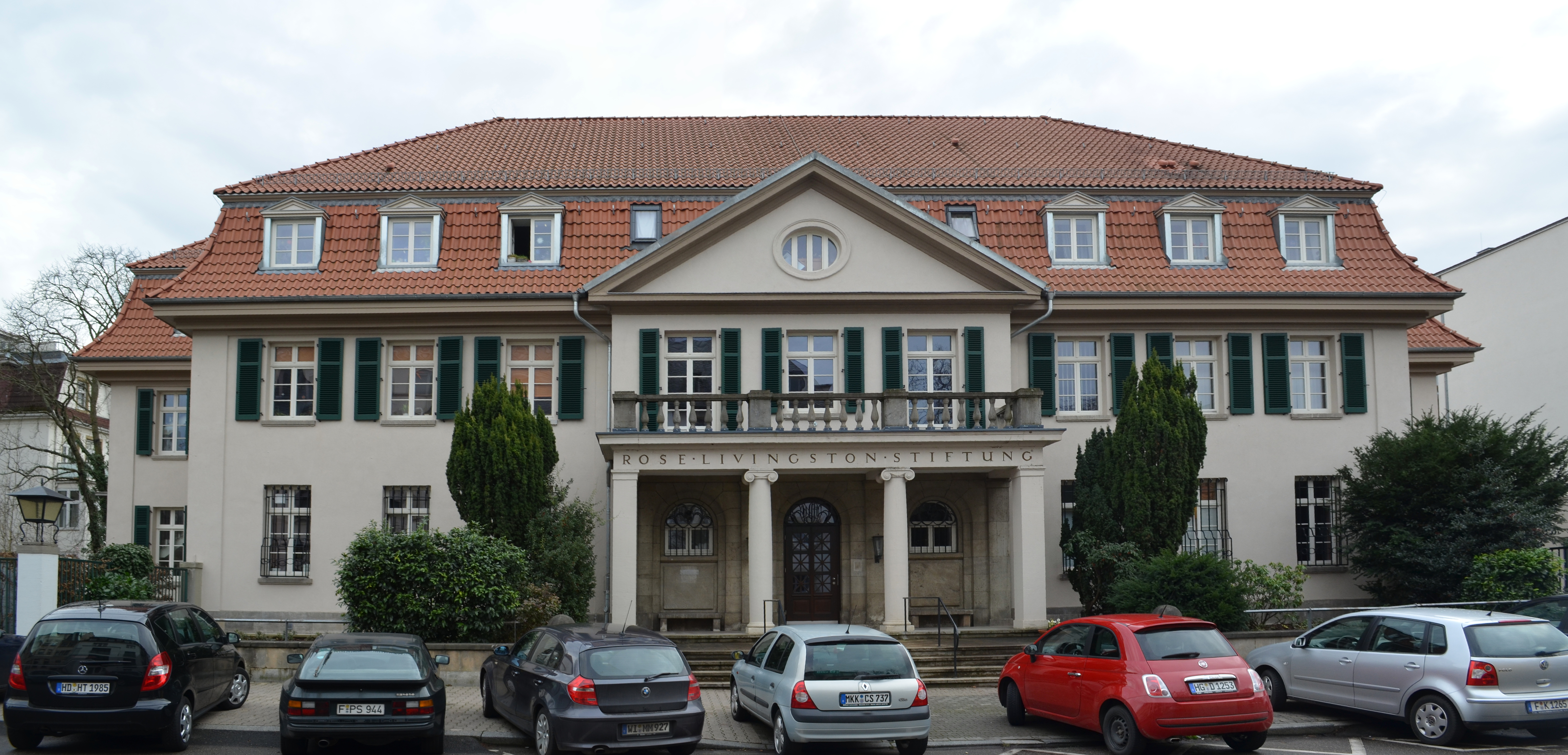 Frankfurt, Cronstettenstraße 57, Rose-Livingston-/Nellinistift